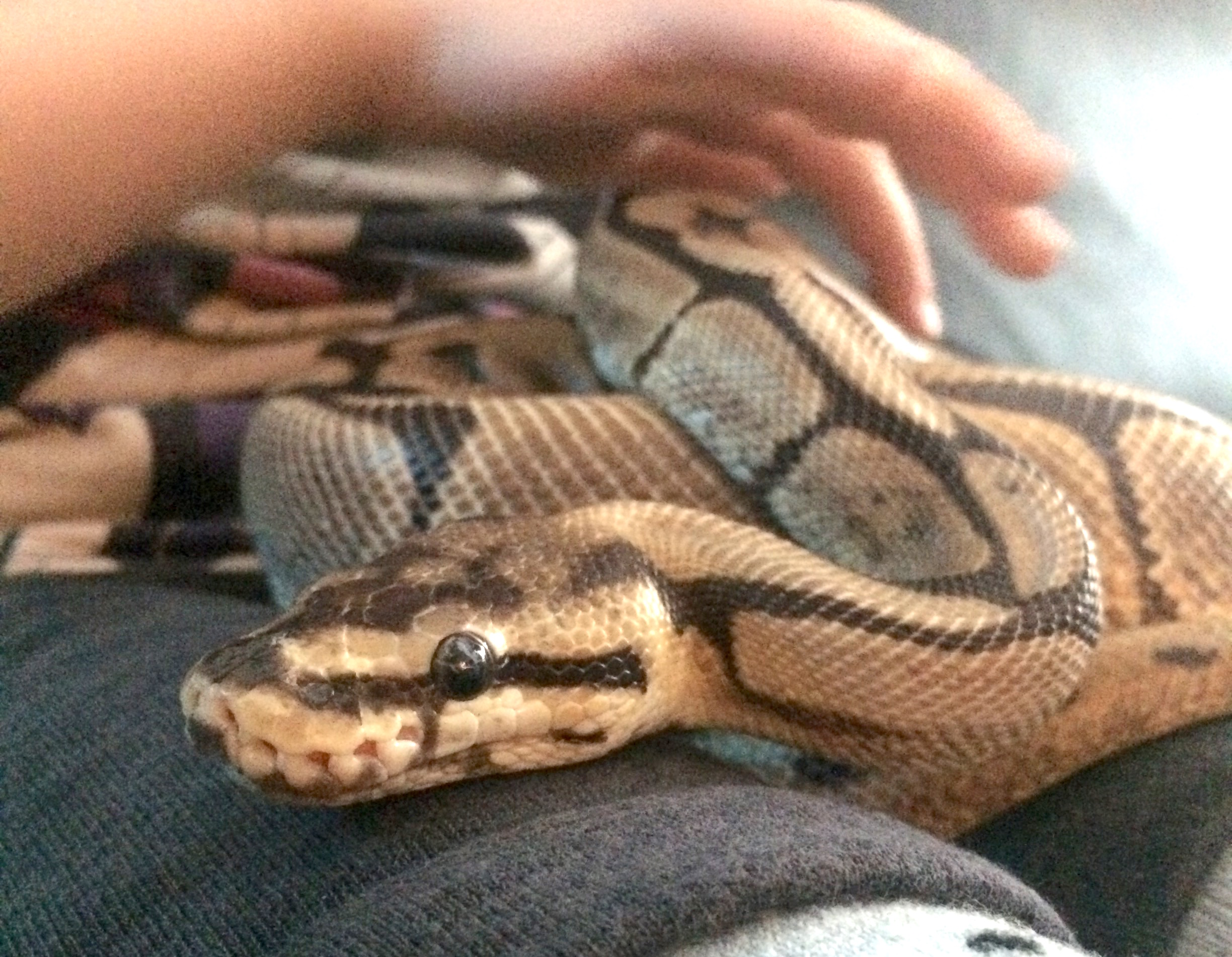 Spideren, er en gentype, der er lidt tricky, da de er fremavlet ved meget indavl, og derfor er meget modtagelige for medfødte skavanker, bla wobble, og derfor bør denne type ikke reproduceres med en enden Spider.